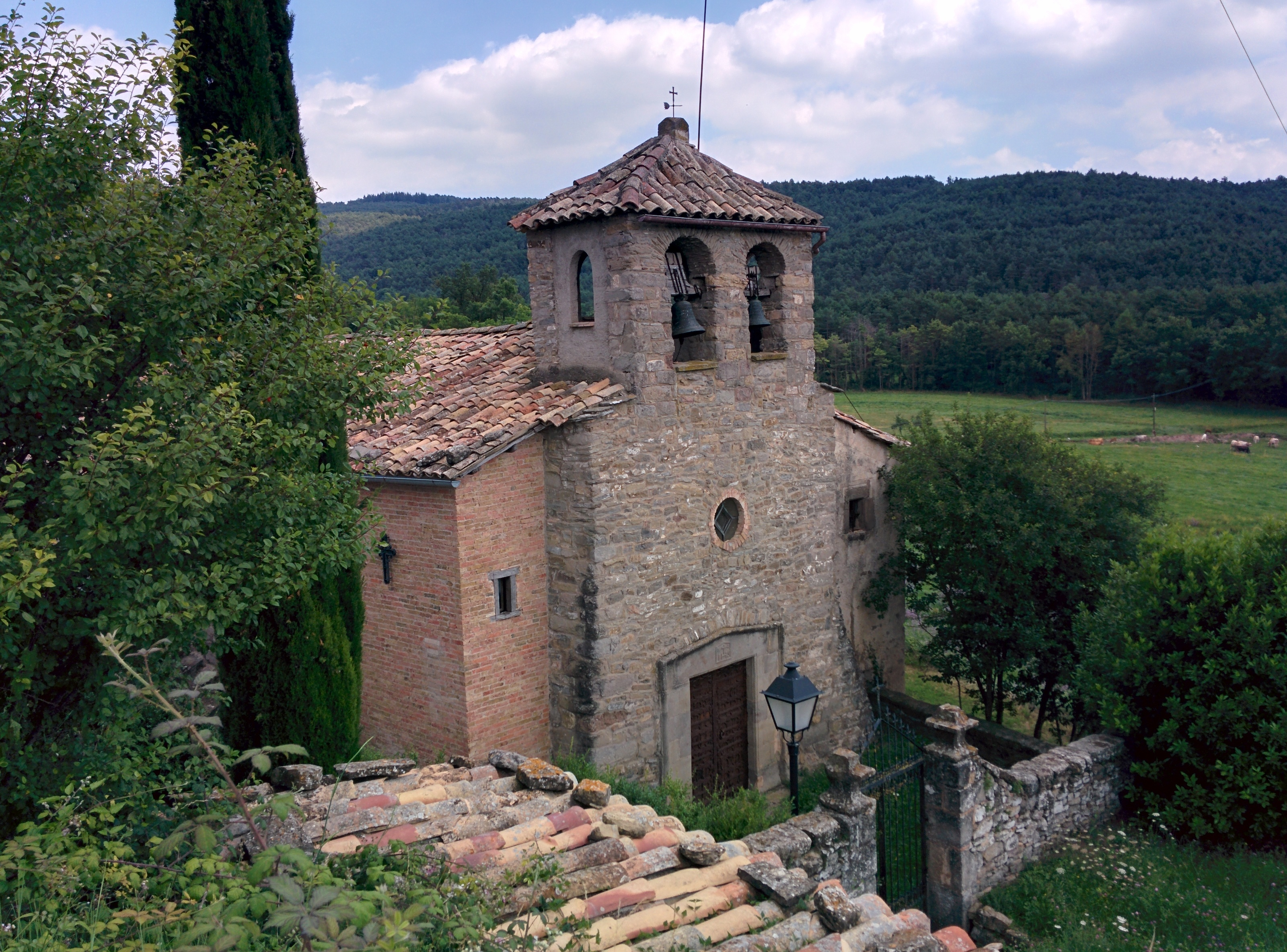 Església parroquial de Sant Agustí (Sant Agustí de Lluçanès)